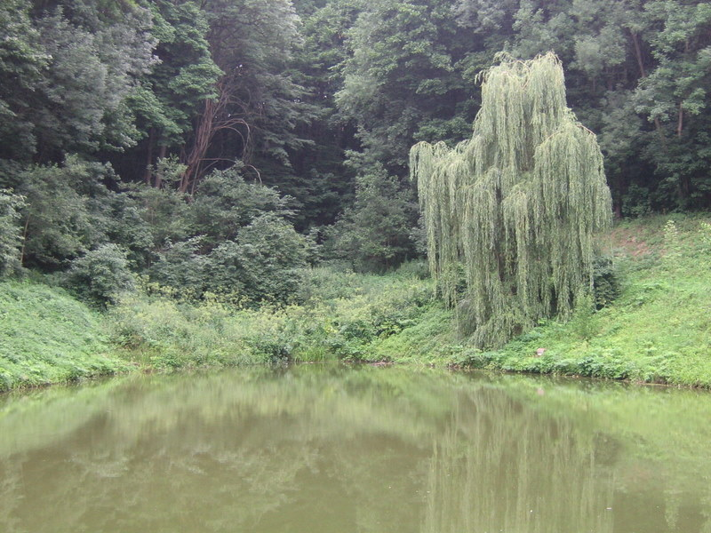 Гайдамацький став. Монастирський ставок.